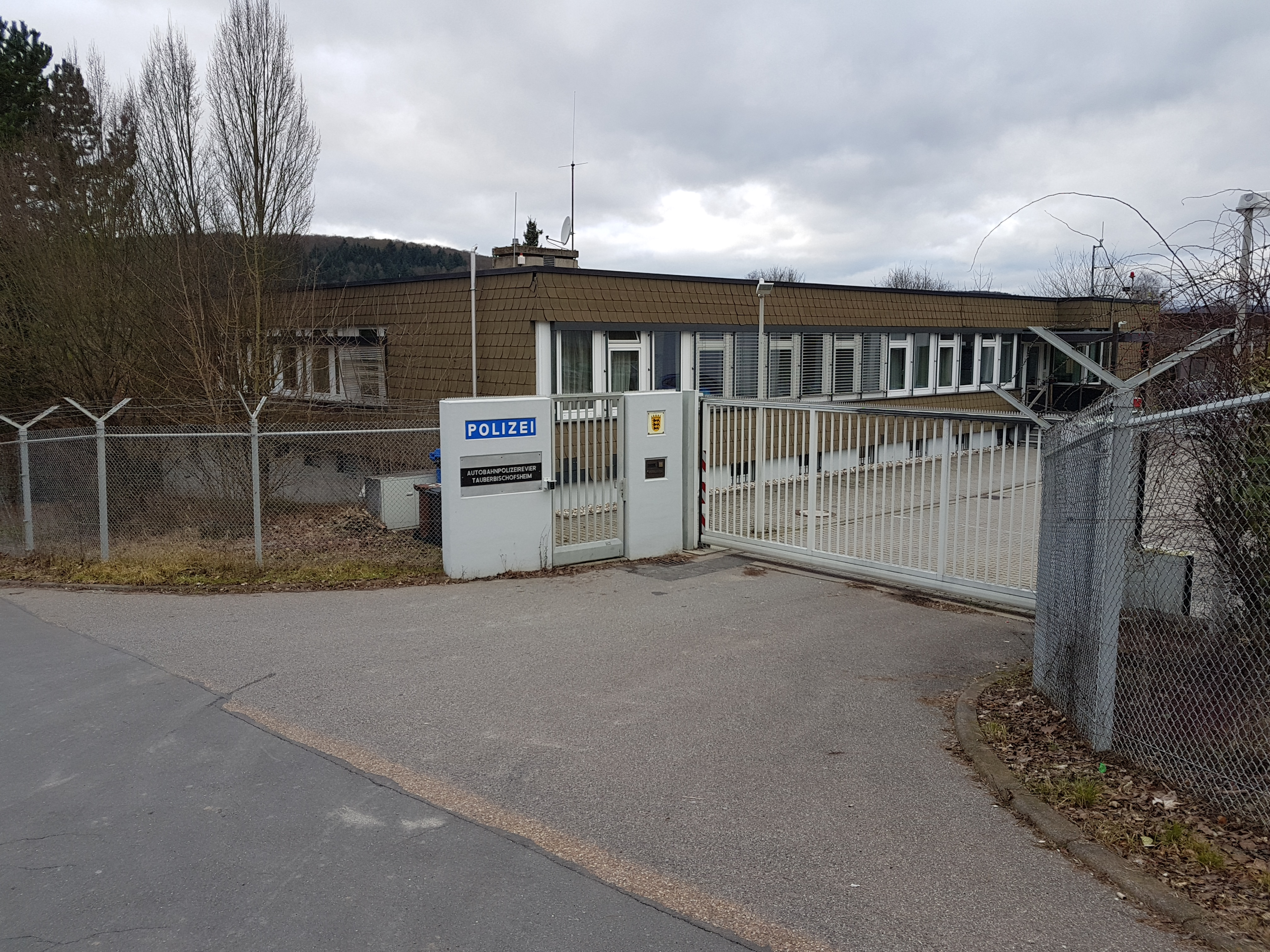 Die Autobahnpolizei Tauberbischofsheim (auch Autobahnpolizeirevier Tauberbischofsheim), im Tauberbischofsheimer Stadtteil Distelhausen, an der Anschlussstelle Tauberbischofsheim (Autobahnabfahrt) der Bundesautobahn 81. In unmittelbarer Nähe (etwas oberhalb) befindet sich auch die Autobahnmeisterei Tauberbischofsheim.